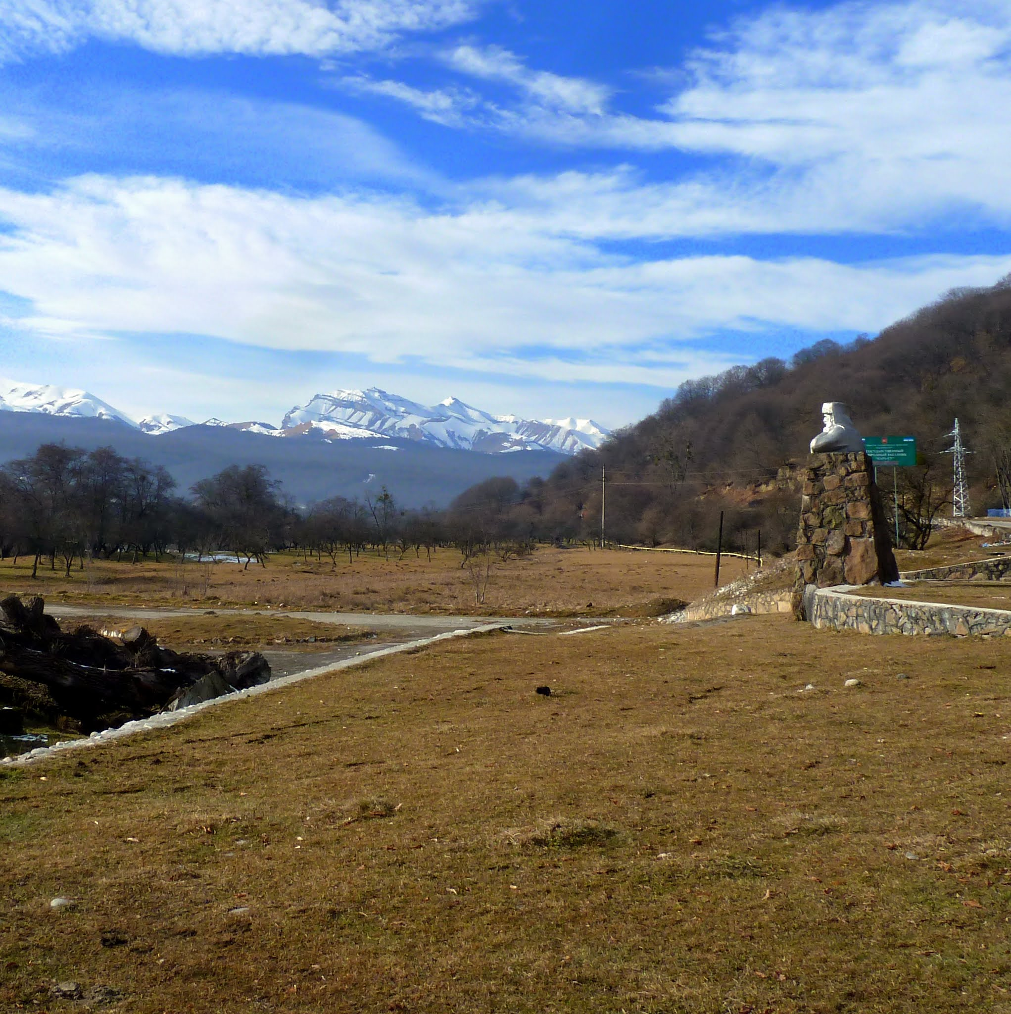 Бабугент. Долина Черека Хуламского, Кабардино-Балкарская Республика